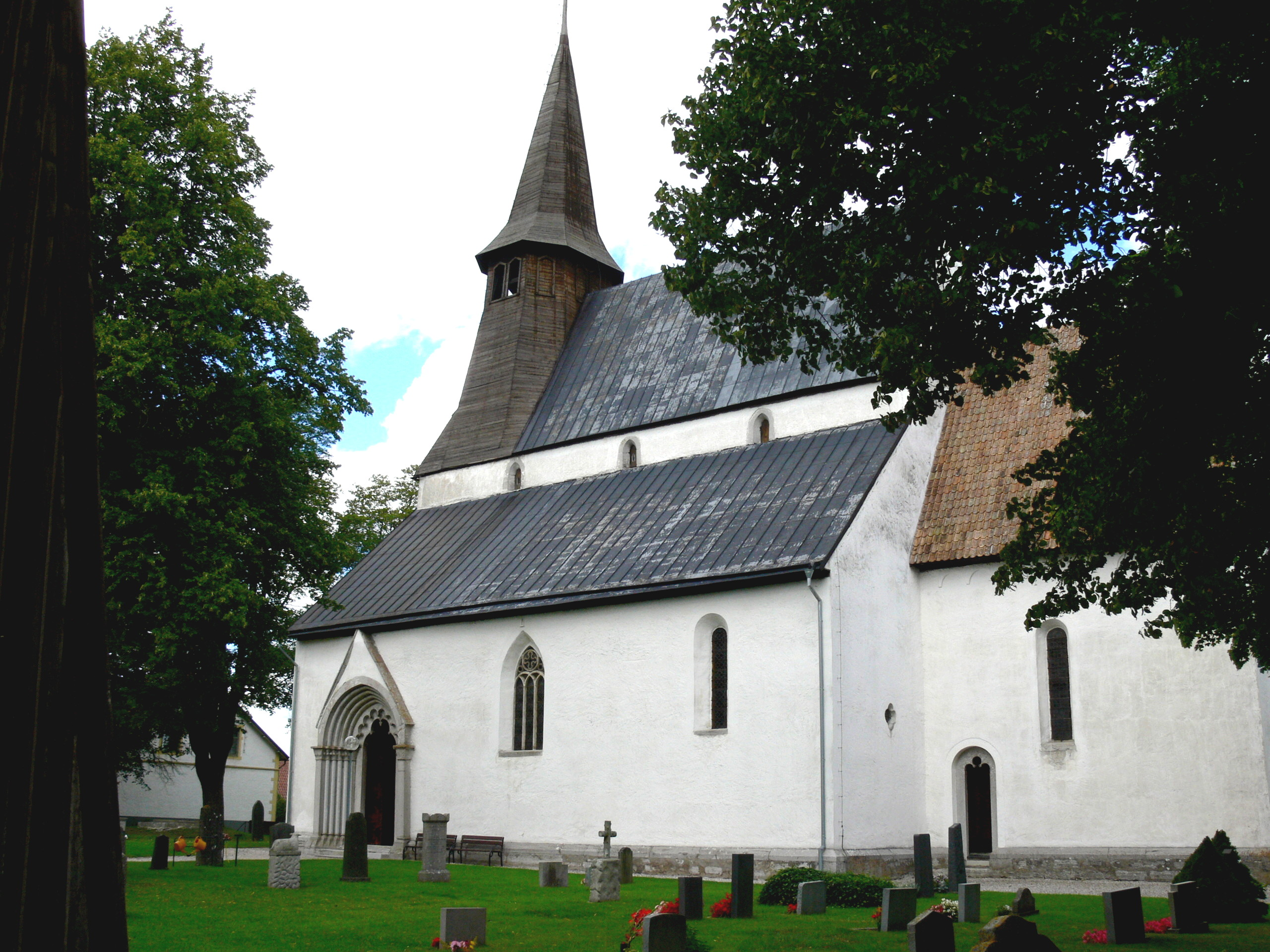 Roma kyrka auf Gotland. Außenansocht